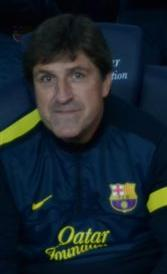 Jordi Roura segundo entrenador del FC Barcelona